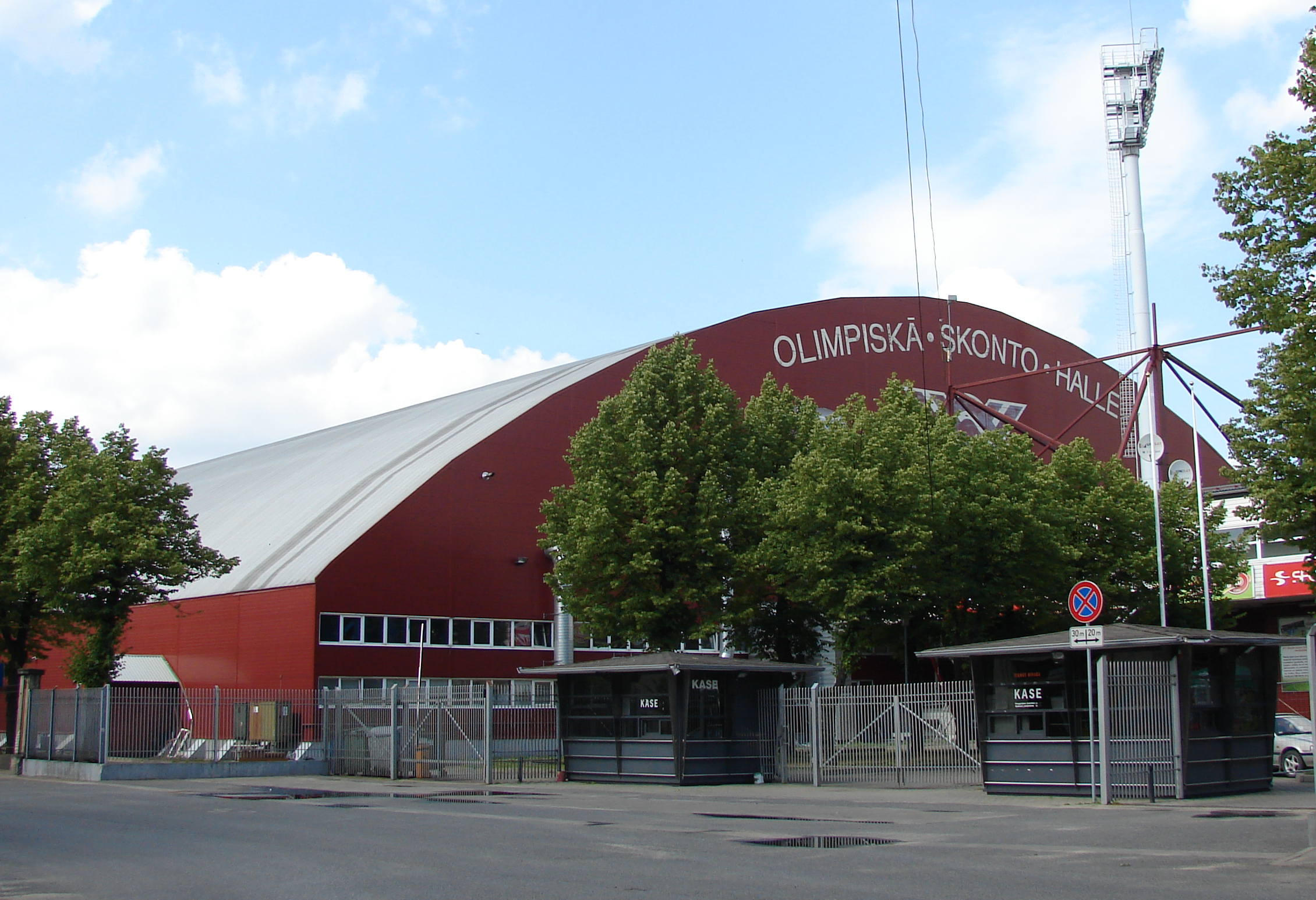 Olimpiskā Skonto halle, Rīga, Latvia